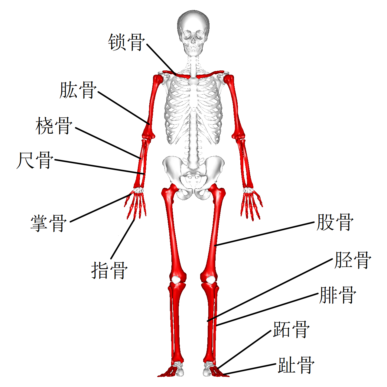 长骨。标示为红色